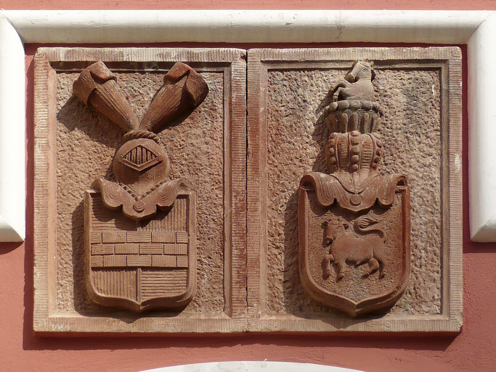 Kartusz herbowy z herbem Tschischwitzów (lewy) i Aulocków (prawy). Nowa Ruda, ul. Kościelna 30 - Dwór Górny, obecnie hotel, XVII, XIX w. (zabytek nr A/940/652/WŁ z 25.05.1977)